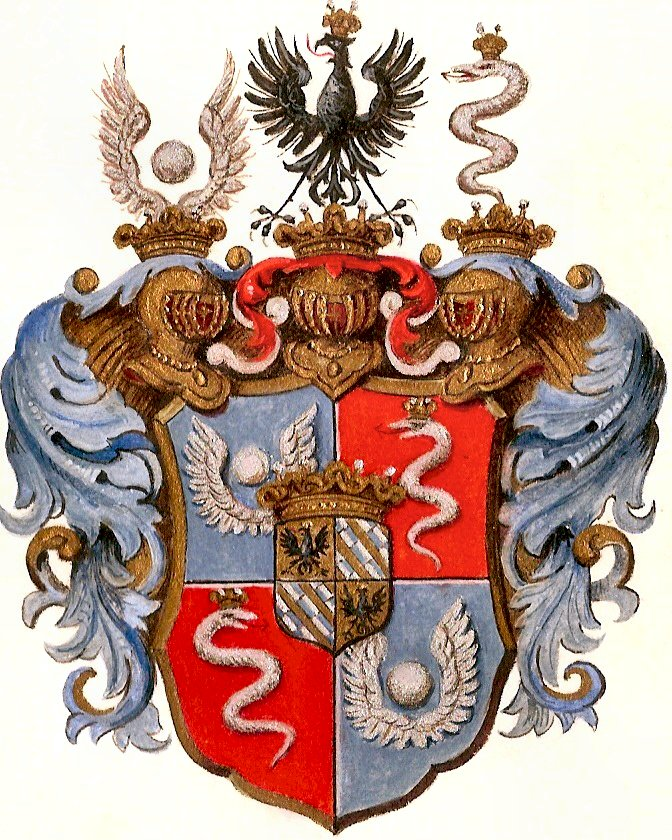 Wappen der Grafen Marenzi 1652